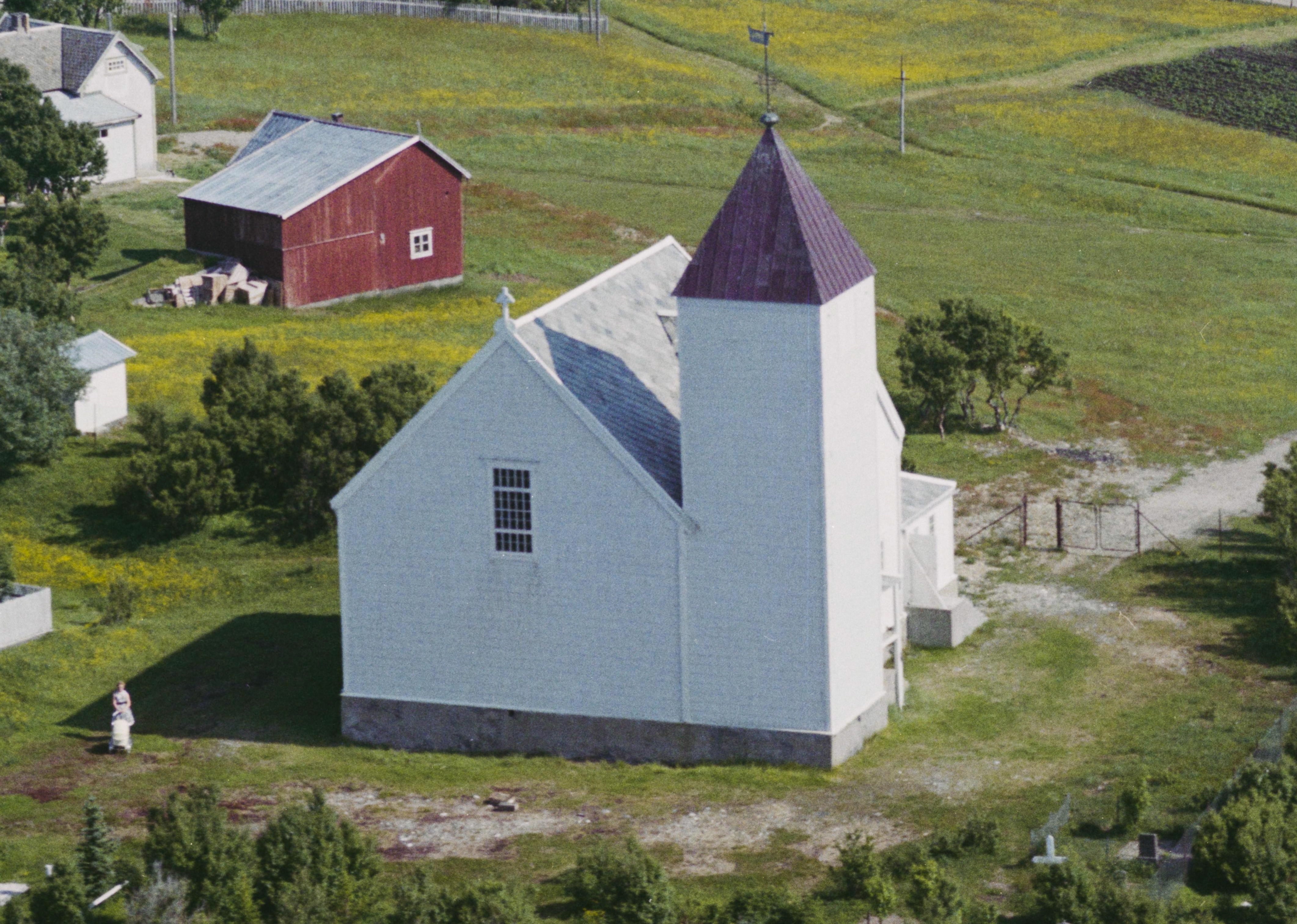 Andørja kirke, Ibestad kommune